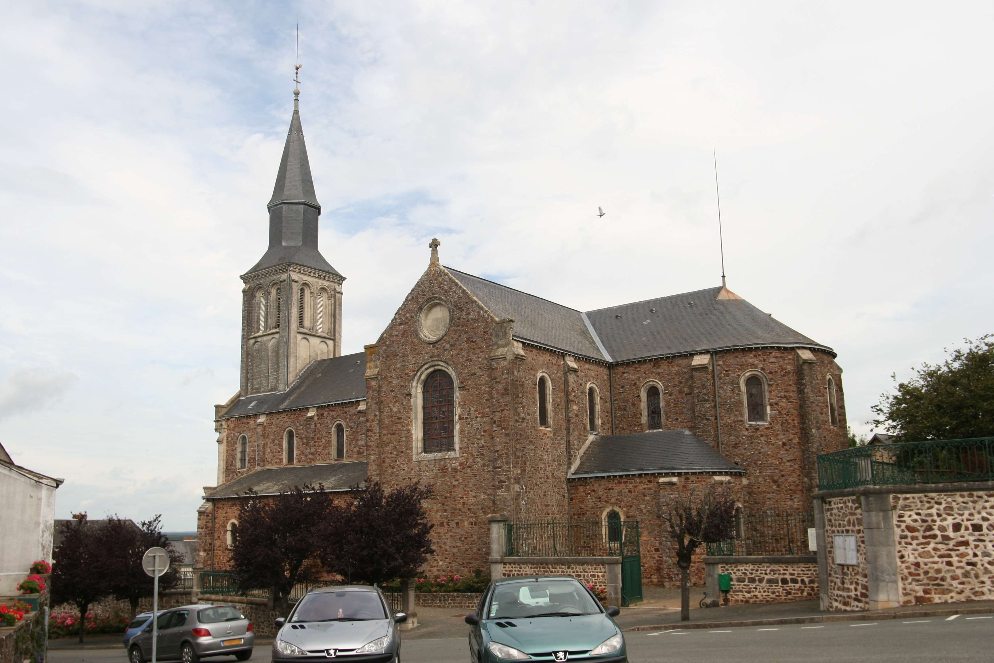 Église Saint-Denis de Saint-Denis-d'Orques.